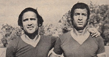 اللاعبان حسن الشاذلي (على اليسار) ومصطفى رياض